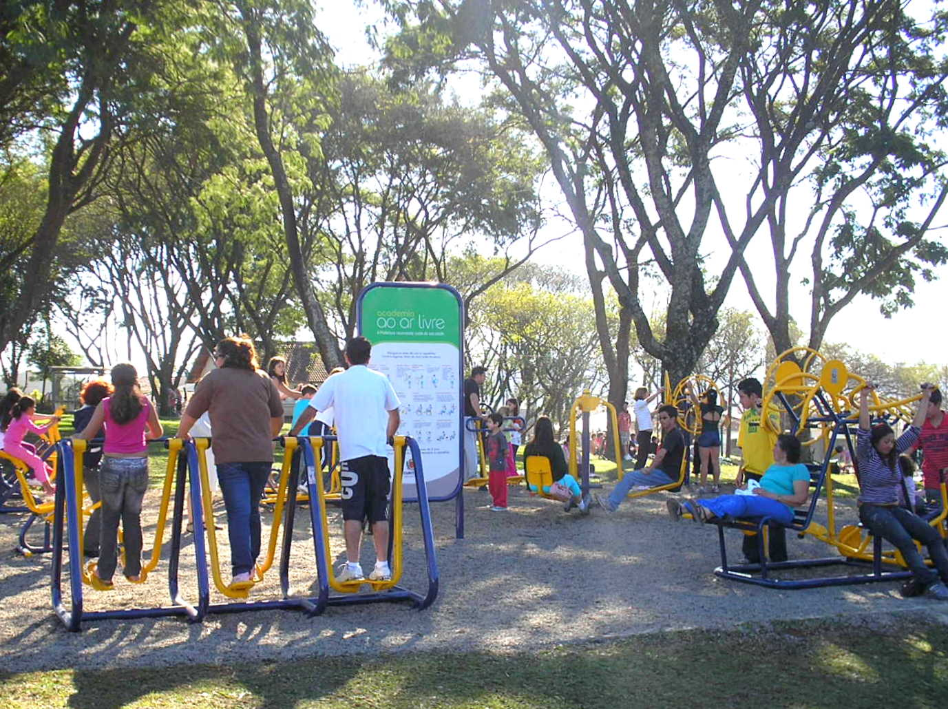 Academia ao ar livre, gratuita, no Jardim Botânico de Curitiba, Paraná, sul do Brasil.